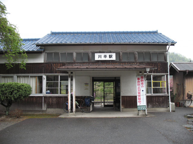 Kawahira-Sta